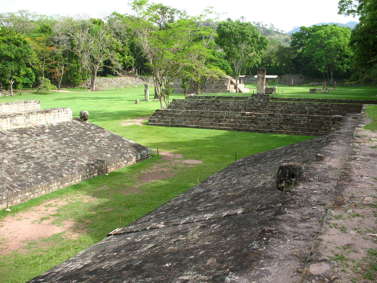 Juego de pelota en las ruinas de Copán (Honduras)